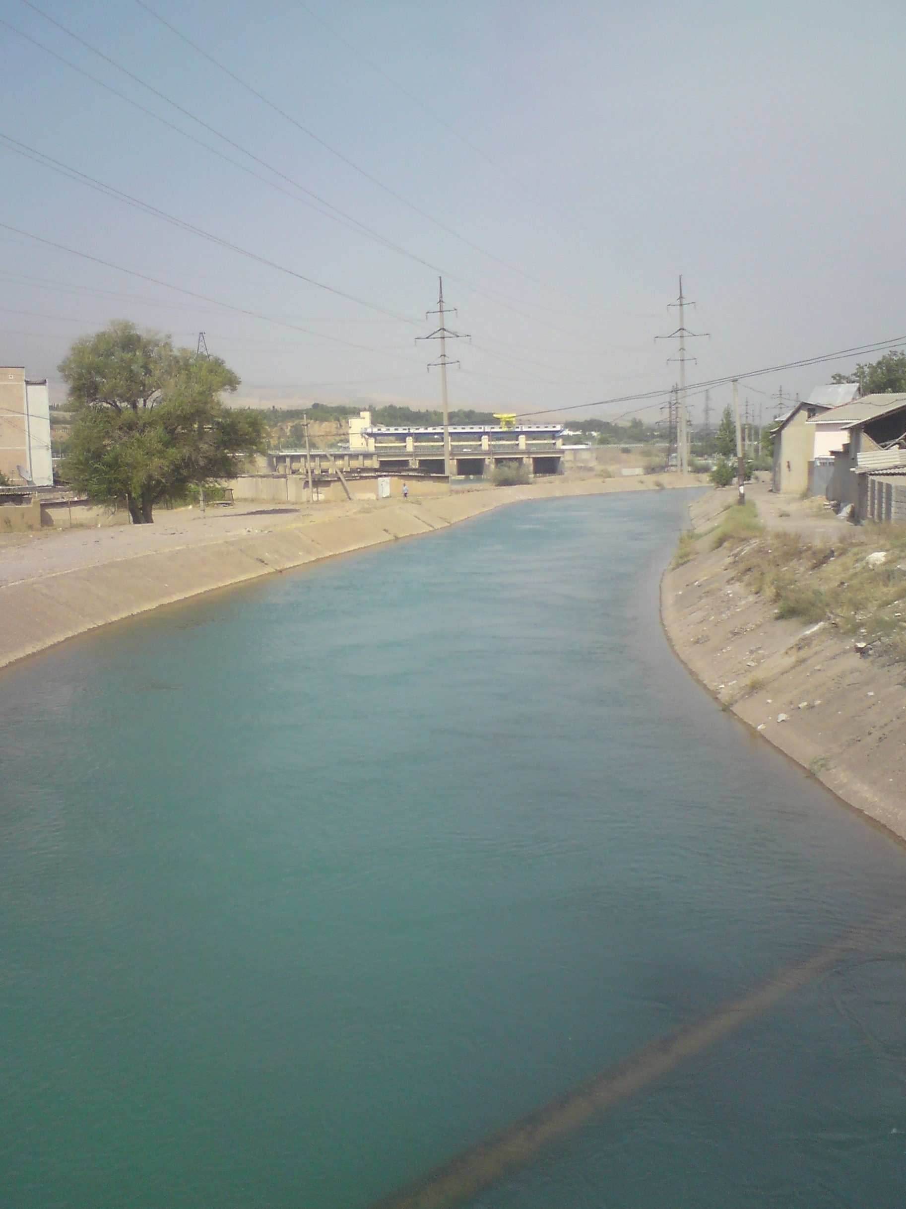 Паркентский магистральный канал, отвод реки Чирчик, несколько ниже начала, город Газалкент, Ташкентский вилоят